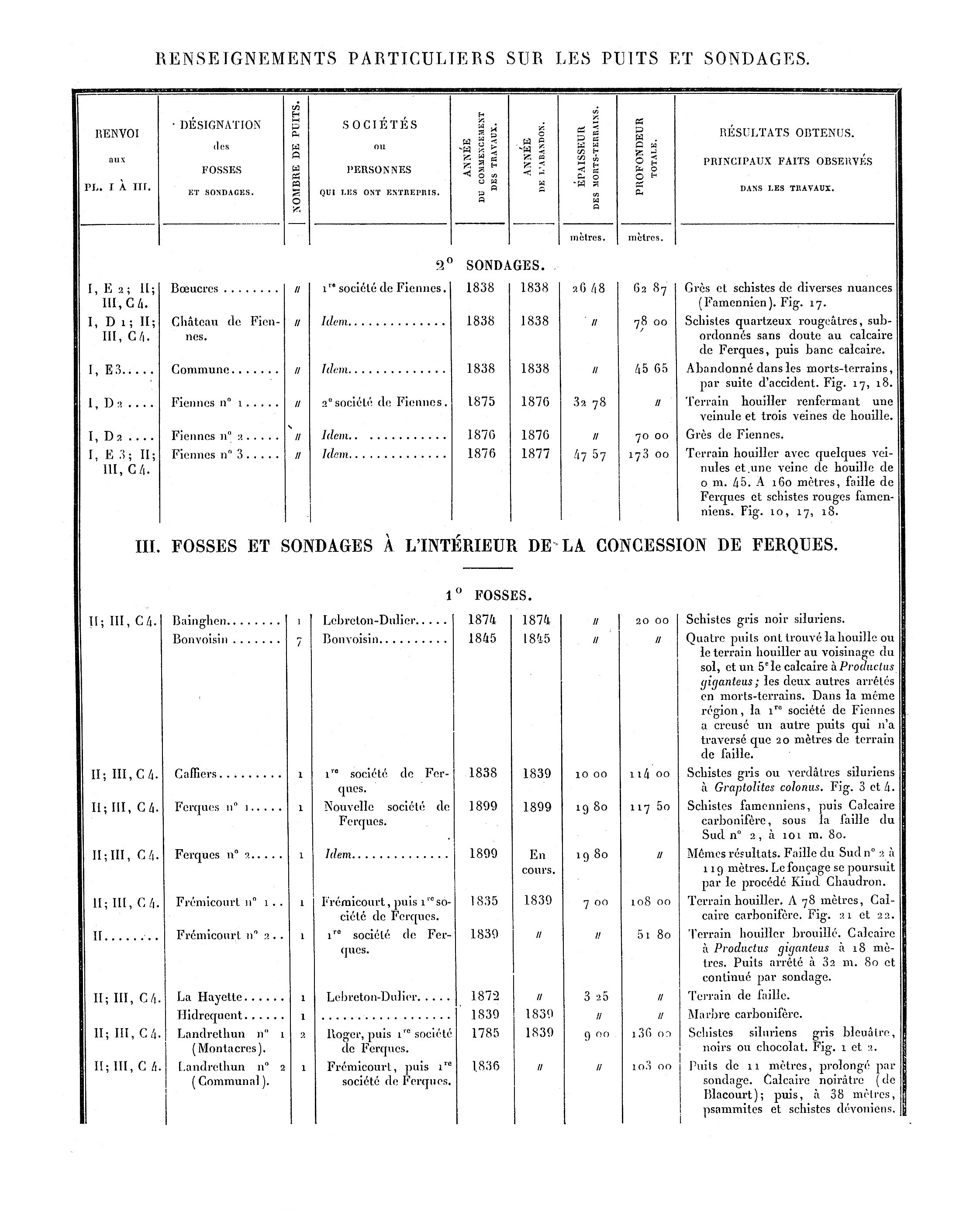 Liste des puits de mine et des sondages. Mines du Boulonnais. Document extrait de Étude des Gîtes Minéraux de la France. Topographie Souterraine du Bassin Houiller du Boulonnais ou Bassin d'Hardinghen, par A. Olry, ingénieur en chef des Mines. Chapitre IX, pages 172 à 189.